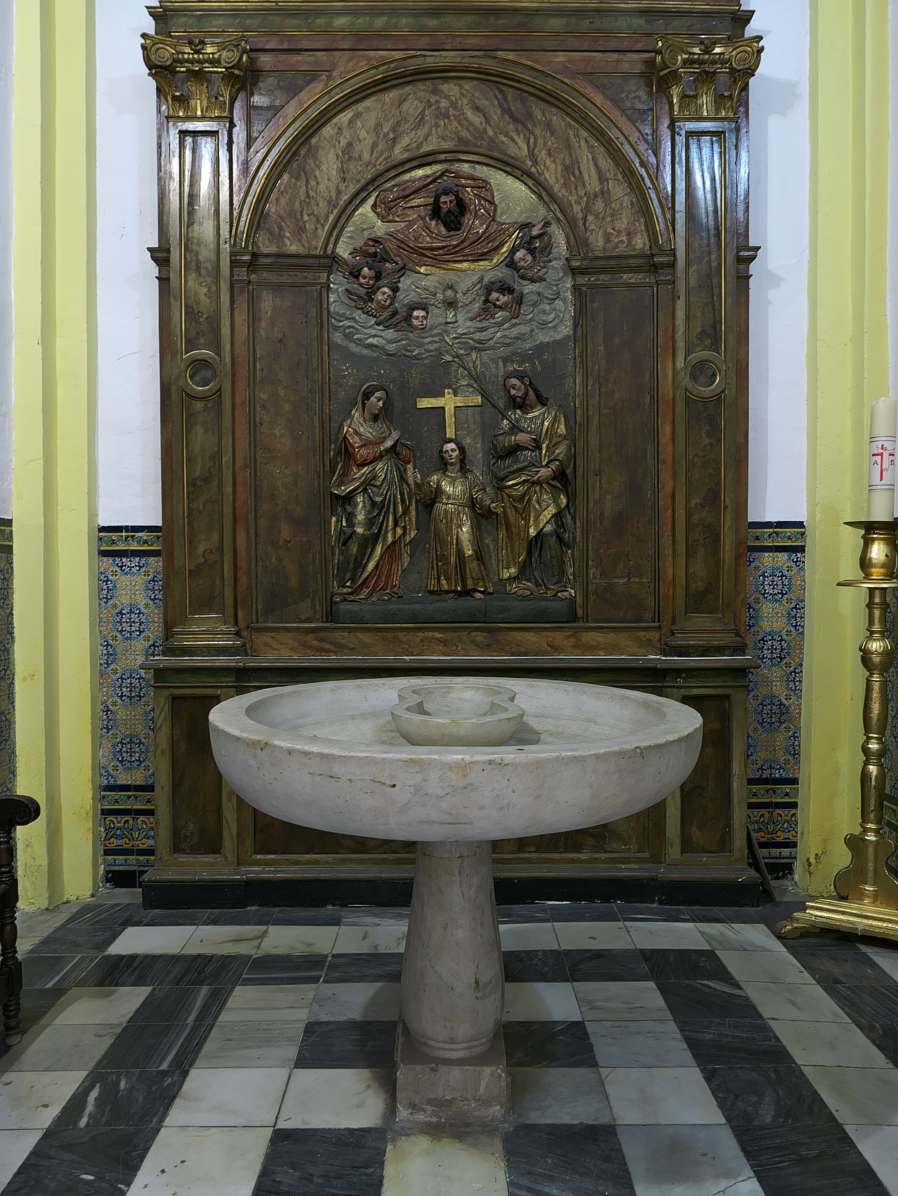 Iglesia de San Ildefonso (Sevilla). Relieve de Juan Martínez Montañés (1609) sobre el simbólico tema la Trinidad terrena y celestial, destinado a un retablo, hoy desaparecido.